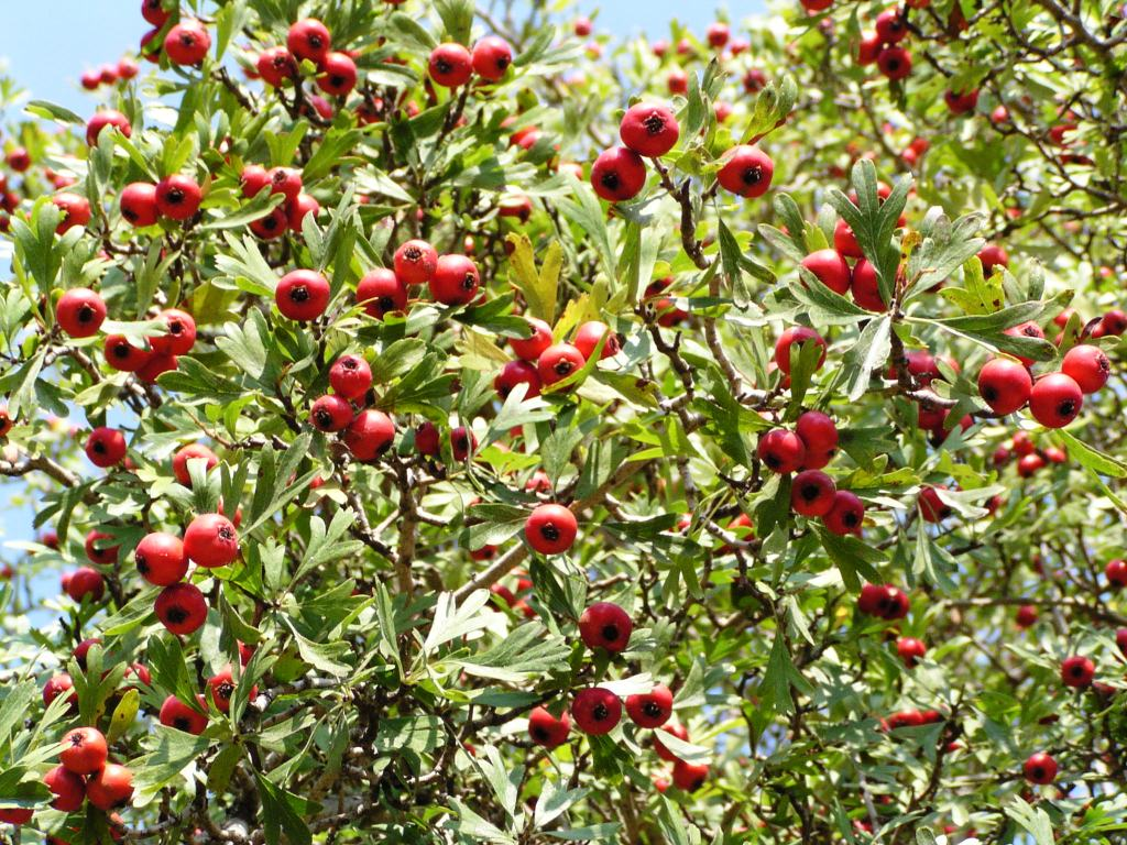 Azaroldorn - Früchte